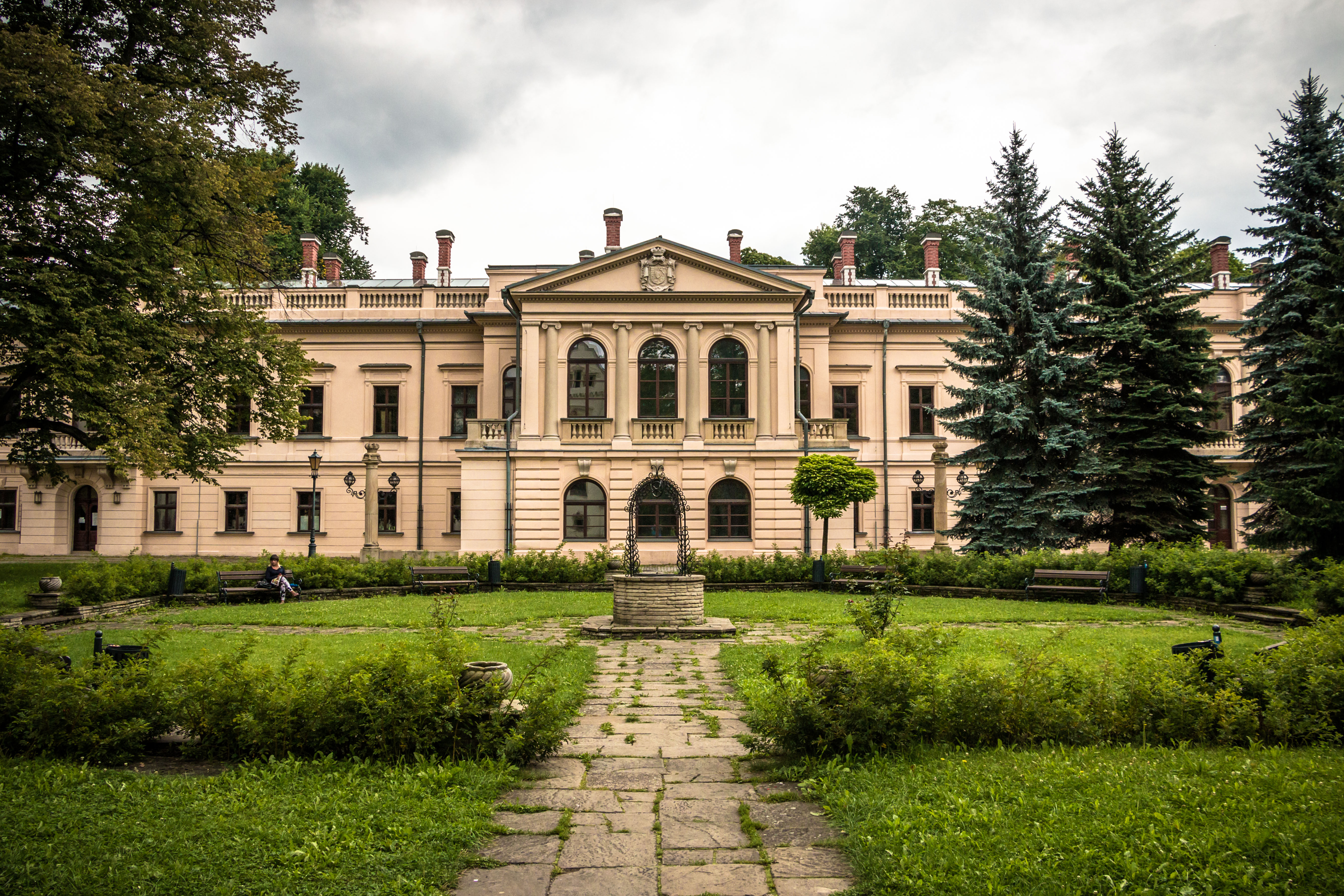 Żywiec, pałac Habsburgów, tzw. nowy zamek, 1885-1895